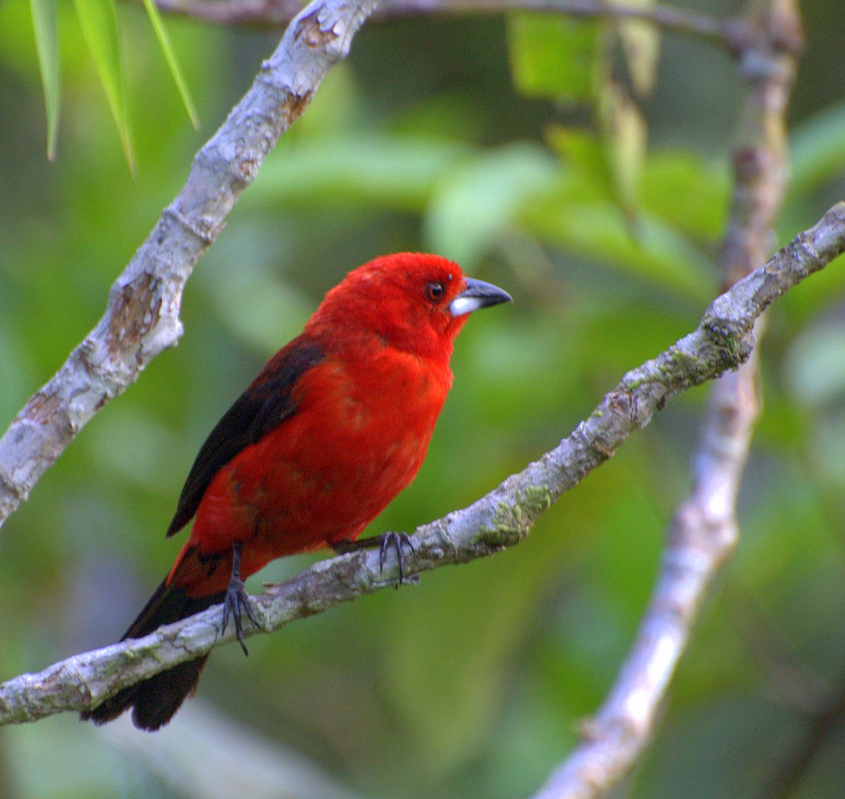 "São Paulo Bagre" no vale do Ribeira, próximo à cidade de Cananeia